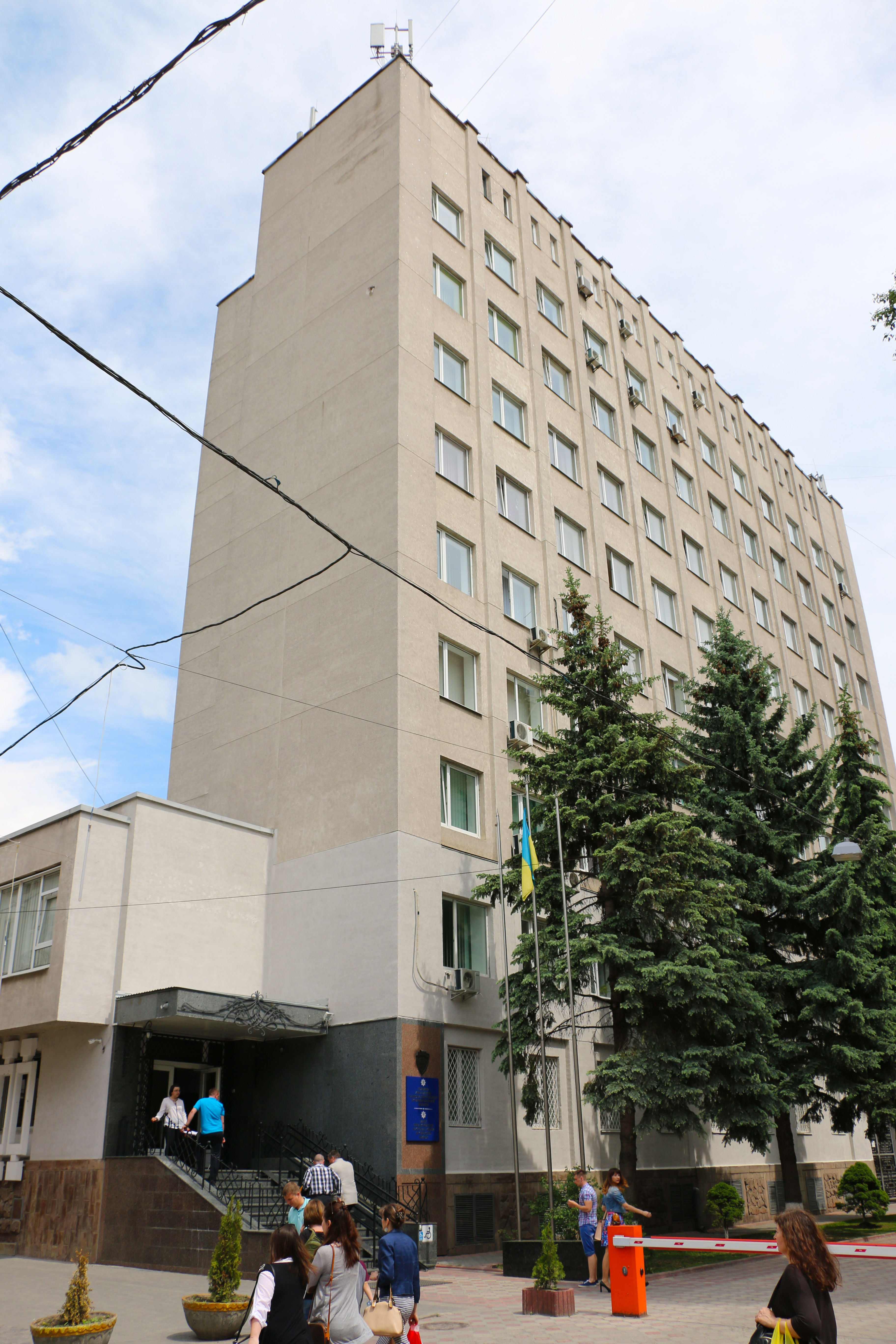 Будинок управління МВСУ в Тернопільській області.